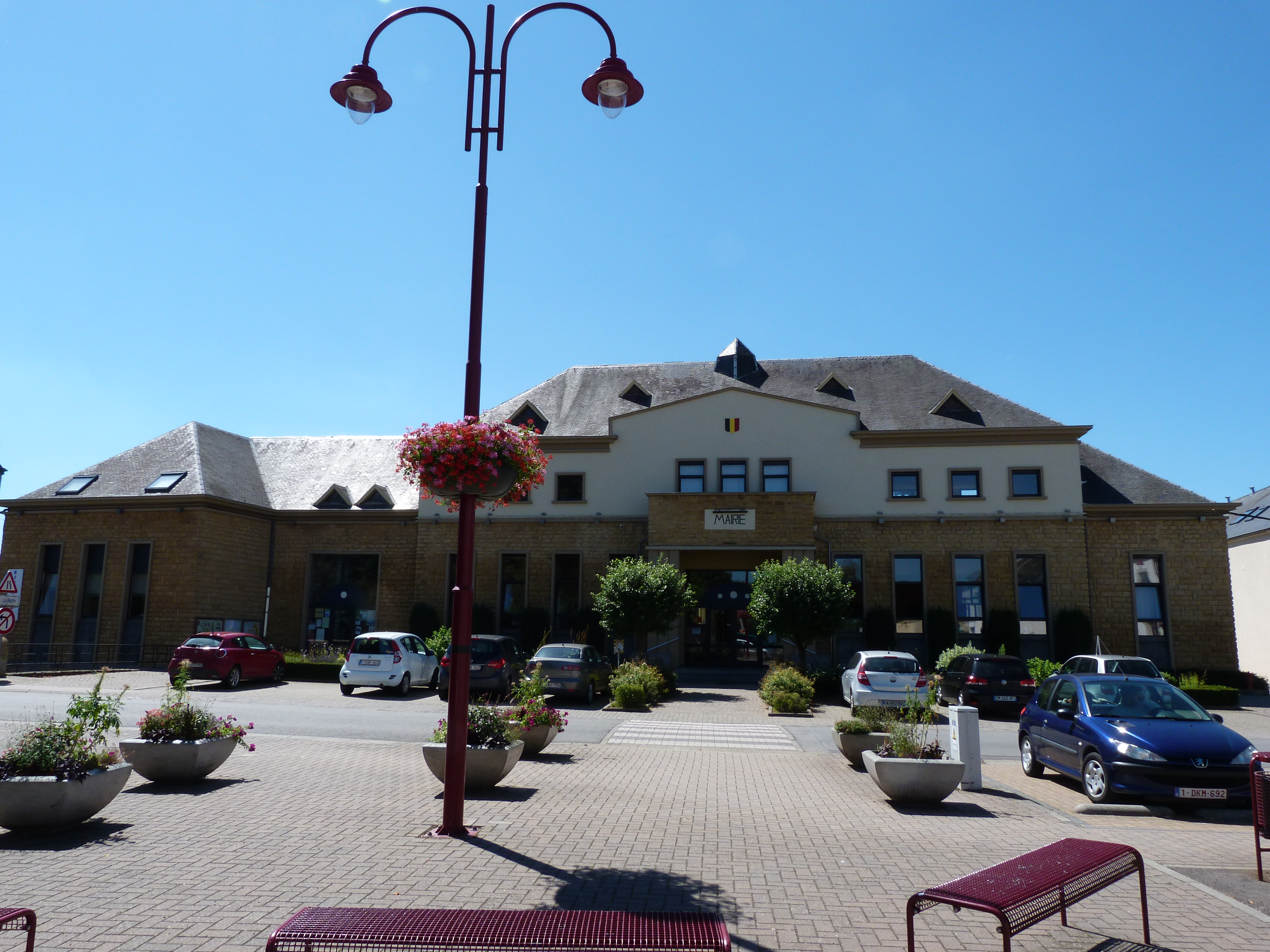 La mairie de Musson en août 2013